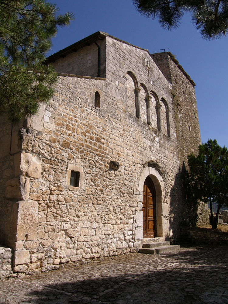 San Benedetto in Perillis